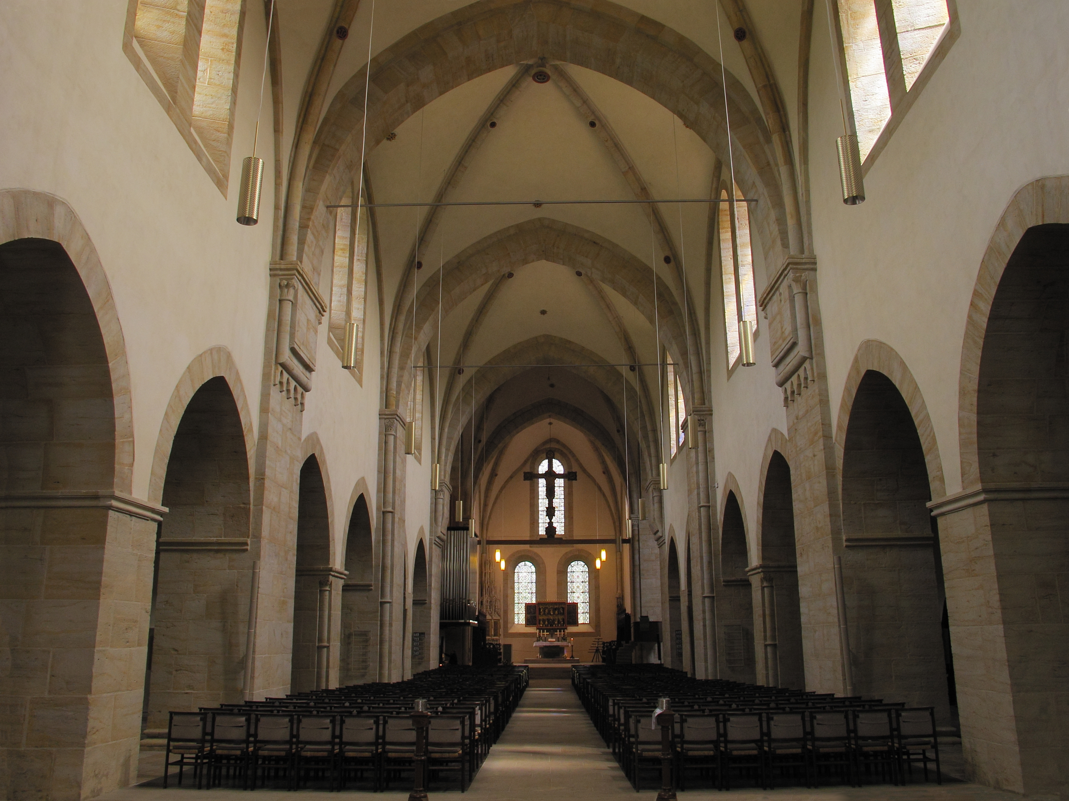 Klosterkirche Loccum: Innenansicht nach Osten